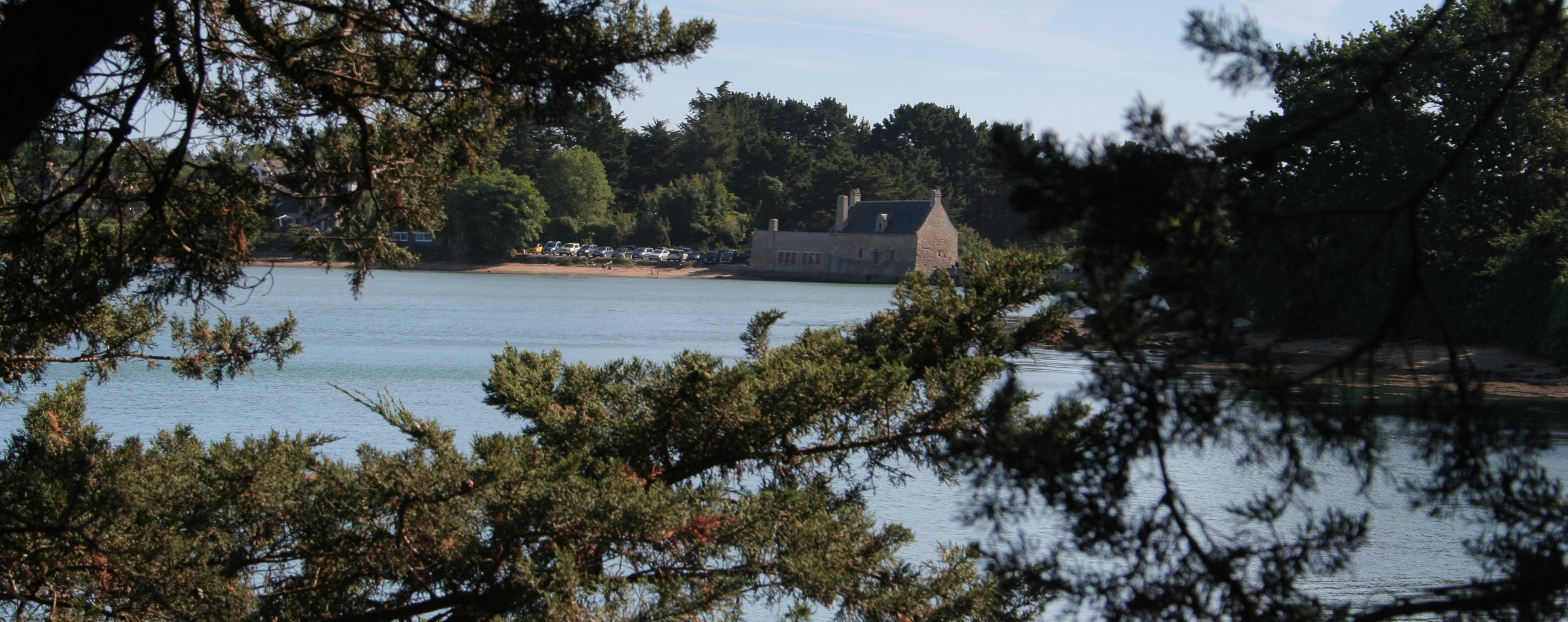 Le Moulin à Marée de Pen Castel (Arzon)